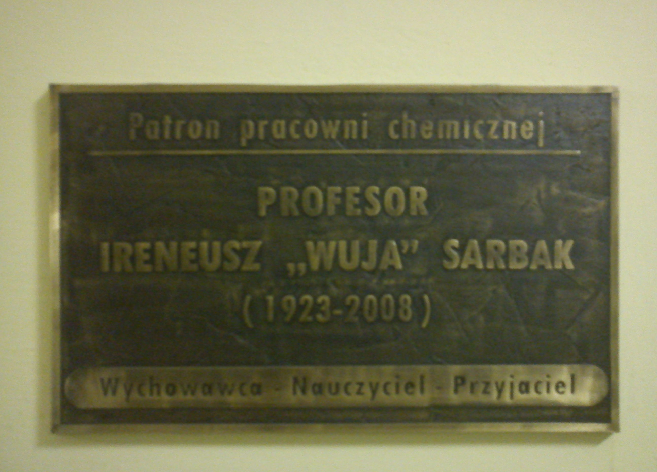 Tablica umieszczona przy pracowni chemicznej w I Liceum w Koninie, której patronem jest profesor Ireneusz Sarbak. Napis: „Patron pracowni chemicznej Profesor Ireneusz "Wuja" Sarbak (1923-2008) Wychowawca - Nauczyciel - Przyjaciel“